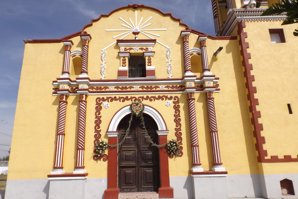 Templo de San Gregorio Aztatoacan, San Salvador el Verde, Estado de Puebla, México.